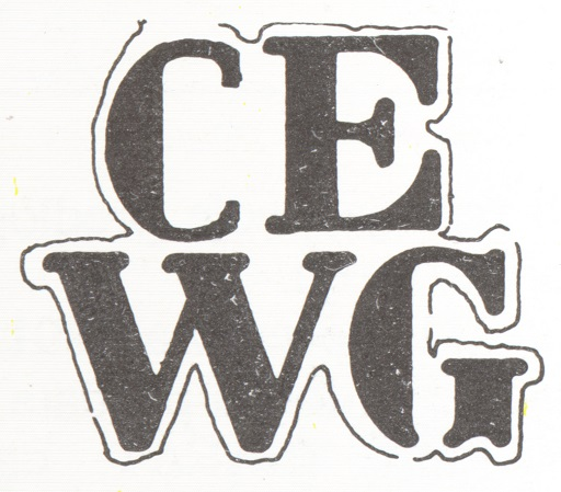 Logotip avstrijskega podjetja.